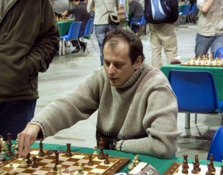 Paweł Jaracz, Warsaw 2006